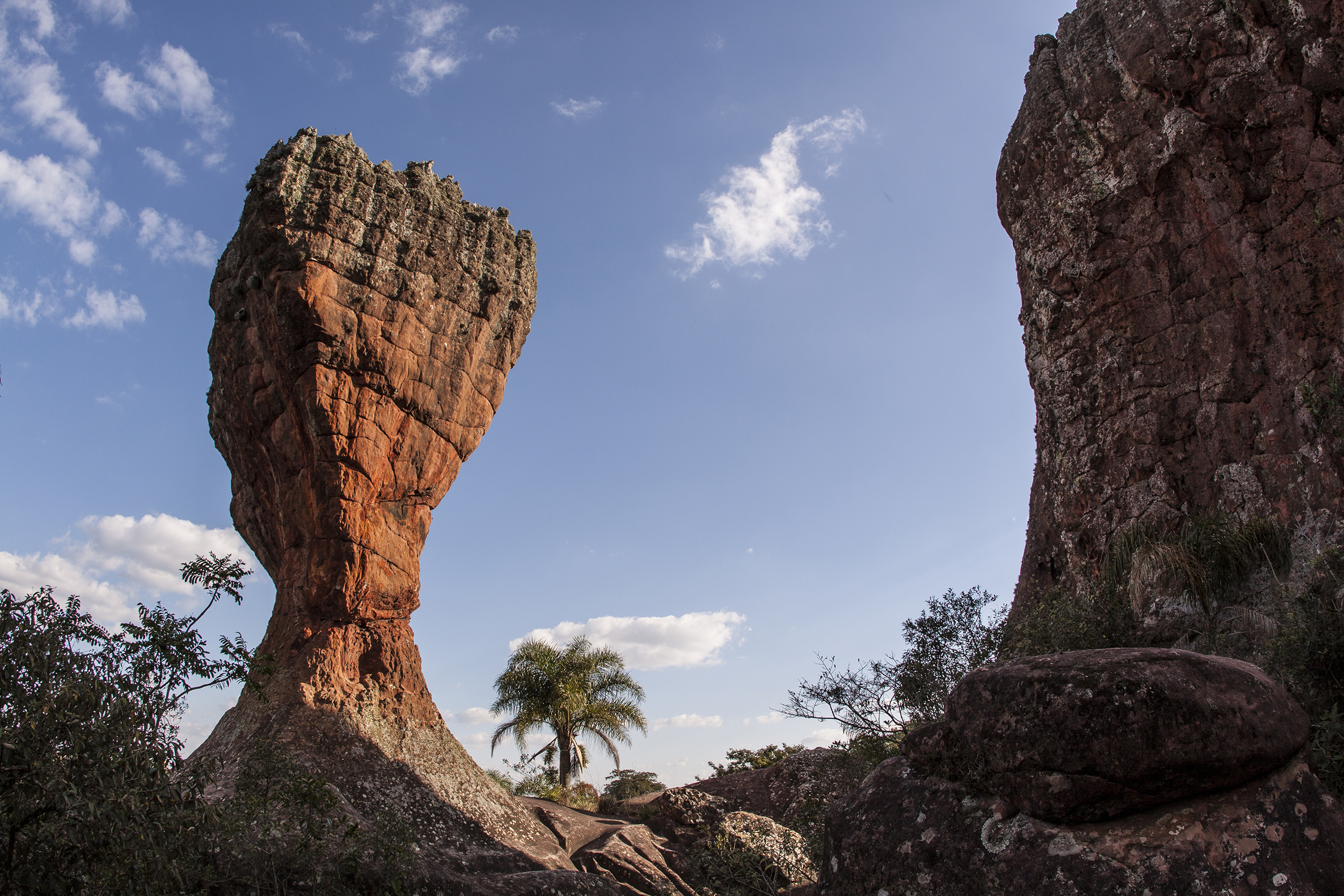 Trilha dos Arenitos no Parque Vila Velha, estimula a imaginação à interpretar as diversas formas ali esculpidas pela natureza.